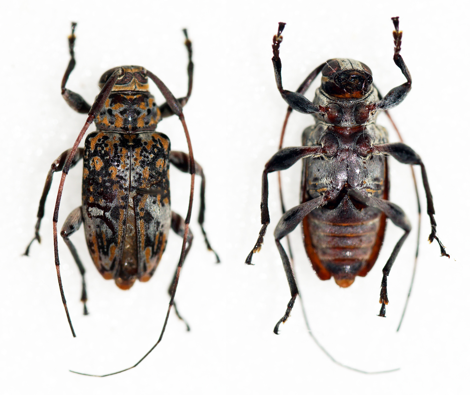 Germar,1824 Sex: Male Data: 01-2010 - Iquitos - Loreto - Peru Size: ?